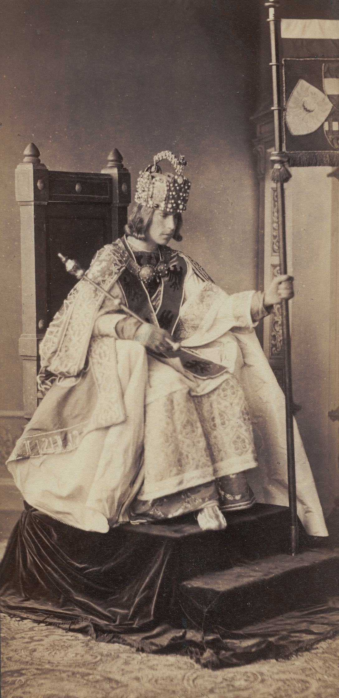 Kronprinz Rudolf als König Rudolph I.